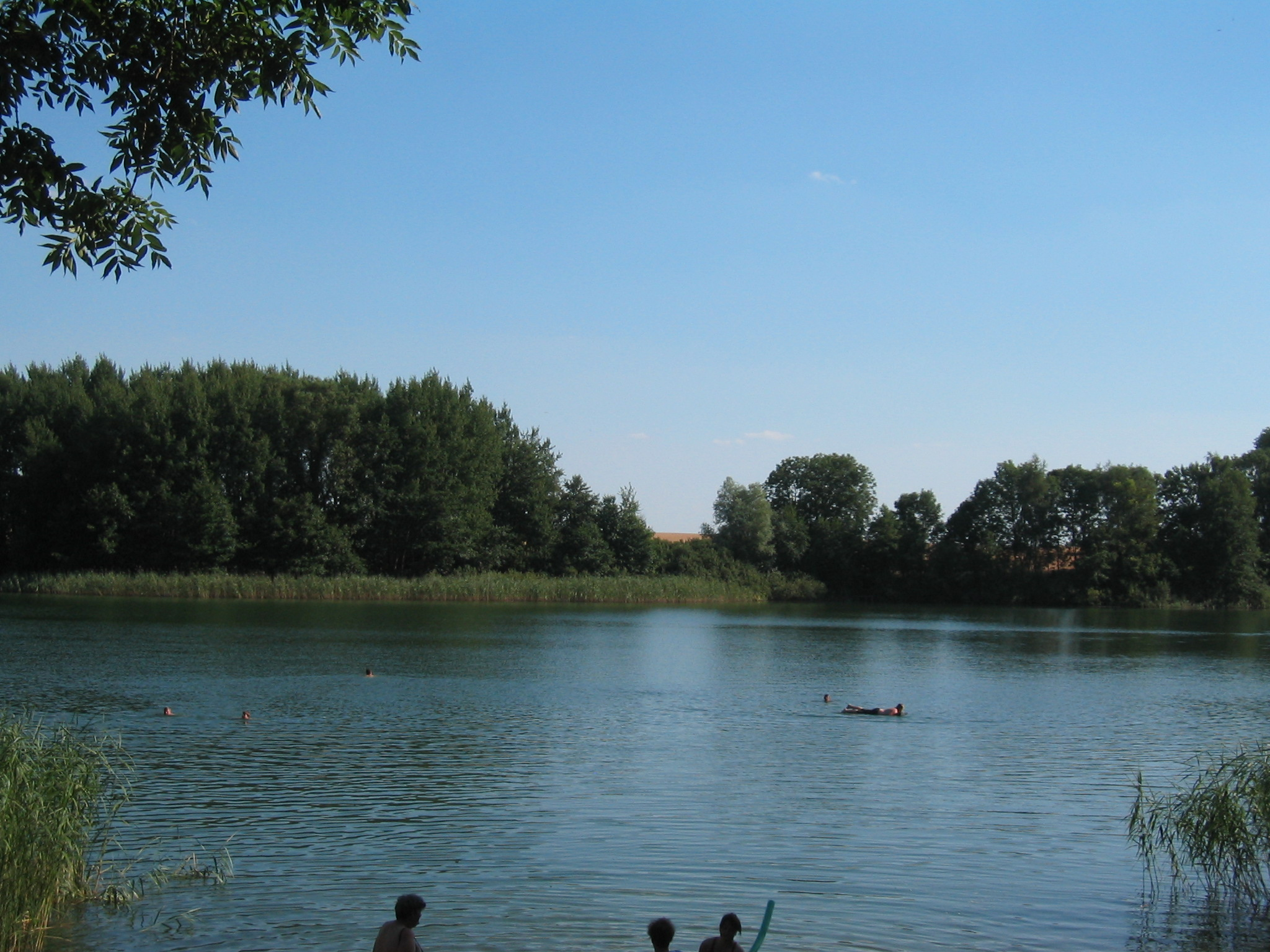 Kleinowsee, südwestlich von Neukleinow